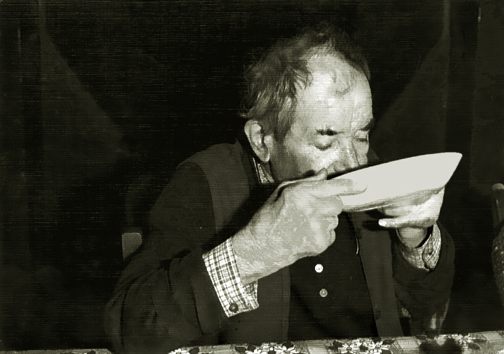 Chabrot ou godaille en Saintonge